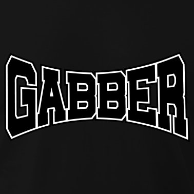 scritta gabber